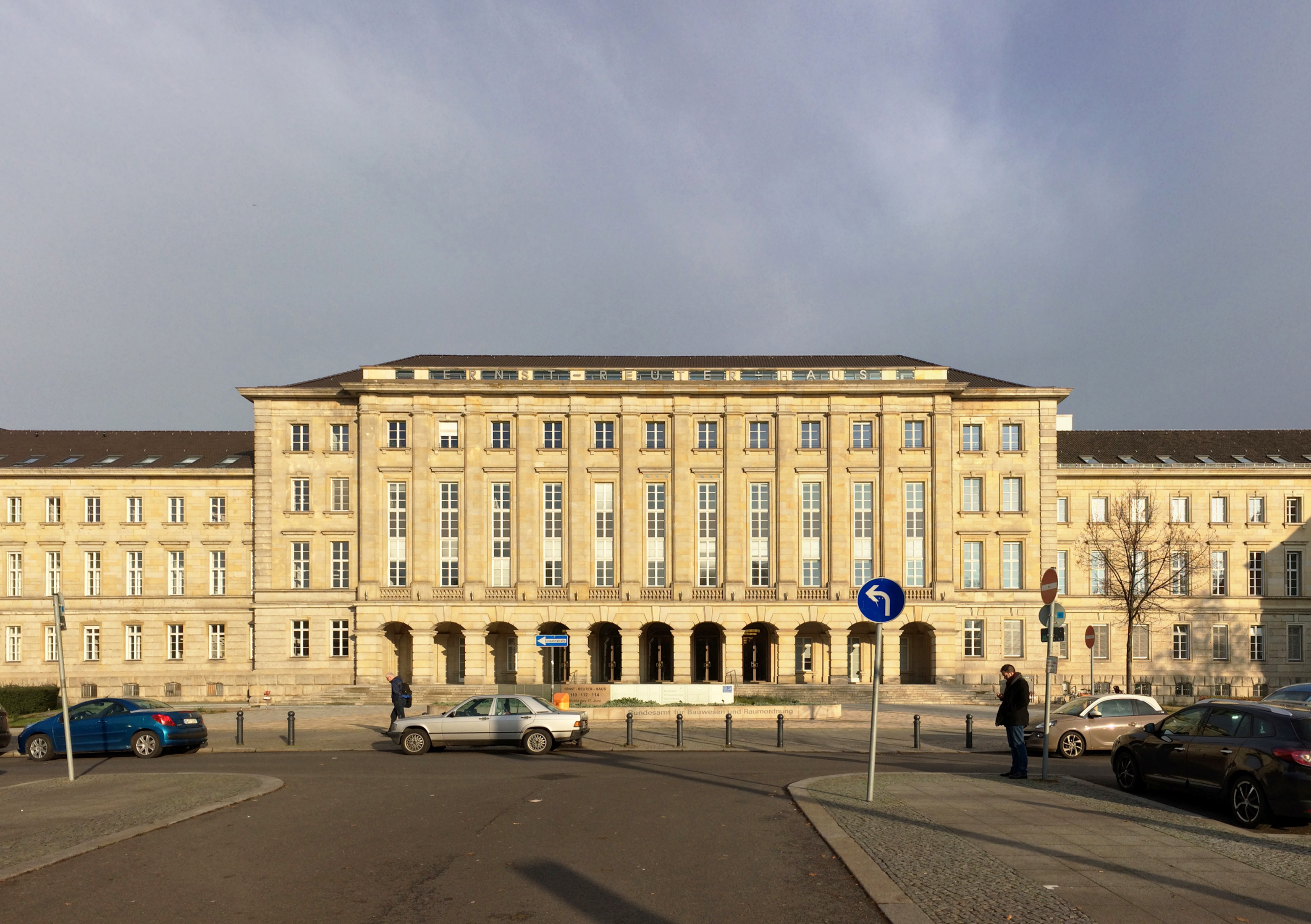 Ernst-Reuter-Haus, Straße des 17. Juni, Berlin-Charlottenburg, 1938–1942, Walter Schlempp und Karl Elkart, Wiederaufbau 1952 Erich Böckler, Umbau 1985 Winnetou Kampmann und Ute Weström, Umbau 2011 Sergei Tchoban von NPS-Tchoban-Voss